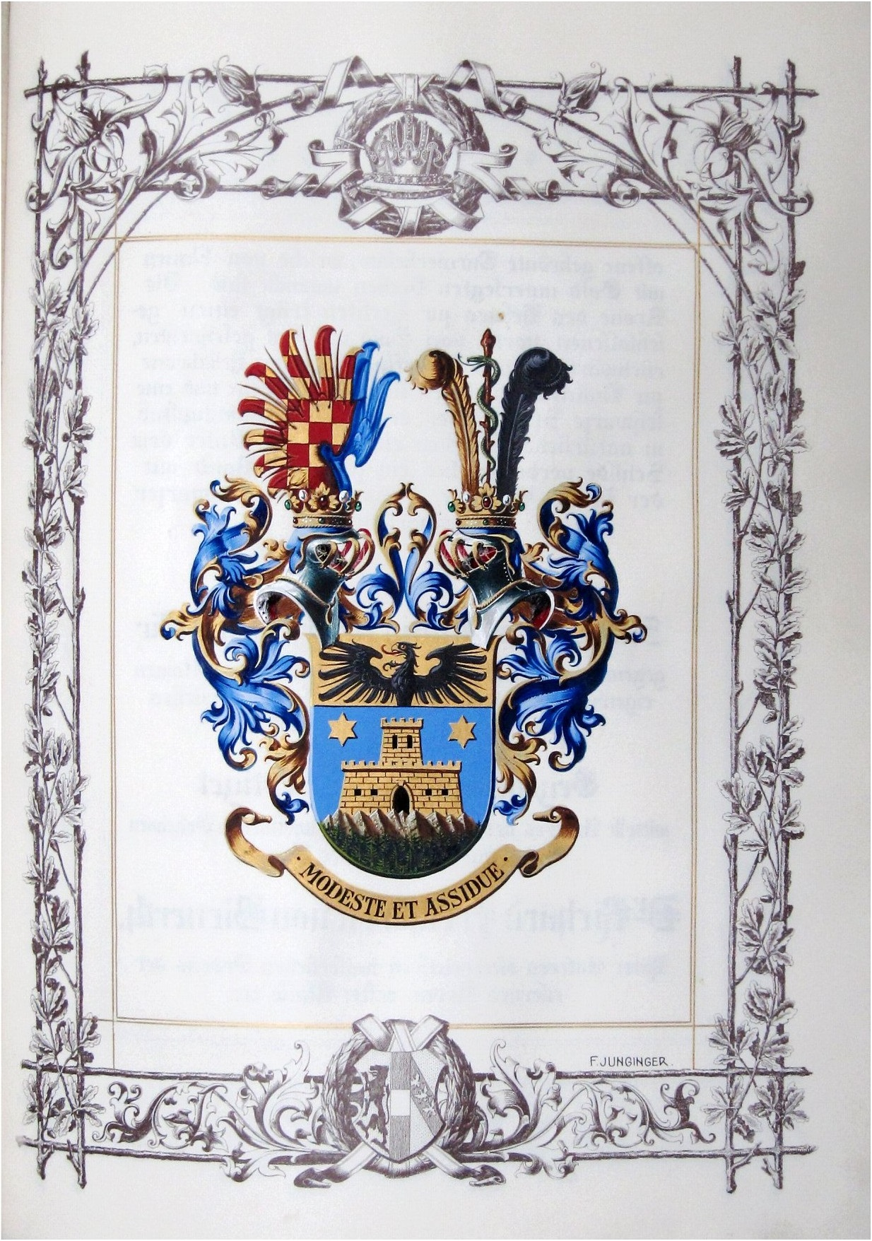 Wappen aus dem Ritterstandsdiplom von Franz Joseph I. (Kaiser von Österreich 1848-1916) für Dr. Florian [Ritter] Kratschmer [von Forstburg]. Ausgestellt Wien, 18. September 1908, mit eigenhändiger Unterschrift des Kaisers, Gegenzeichnung Innenminister Richard Freiherrn von Bienerth. Pergamentlibell (Format 38 x 29 cm), 8 Seiten, teilweise farbige kalligraphische Handschrift auf gestochener Vorlage, farbige Wappenzeichnung signiert "F(riedrich) Junginger". Violett-roter Samteinband, teilweise geprägt, mit goldgeprägter Doppeladlerdarstellung, anhängende Siegelkapsel in vergoldeter Bronze (mit kaiserlichem Wappen auf dem Kapseldeckel), innen "Großes Majestäts-Siegel" in rotem Siegellack.